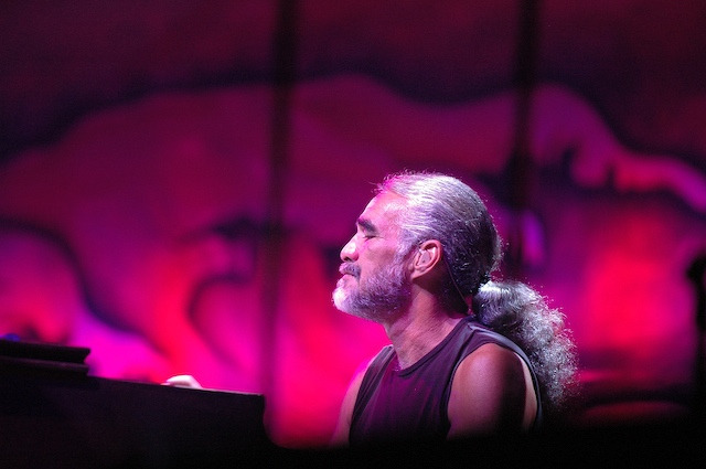 Boom Gaspar 2007-ben, Münchenben a Pearl Jam koncertjén.